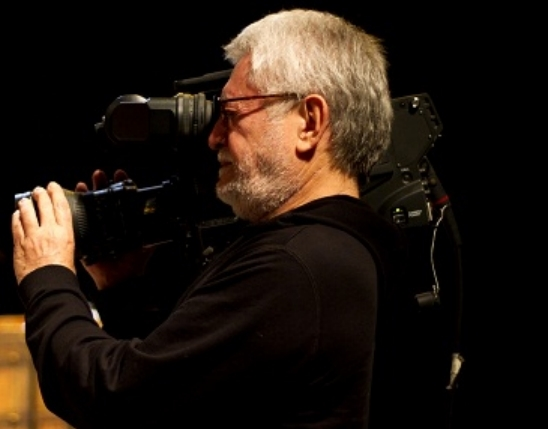 Walter Carvalho, conhecido especialmente por assinar o documentário Janela da Alma (2001), está entre os principais diretores de fotografia em atividade no Brasil. É responsável pela imagem de diversos filmes da chamada "retomada do cinema brasileiro."